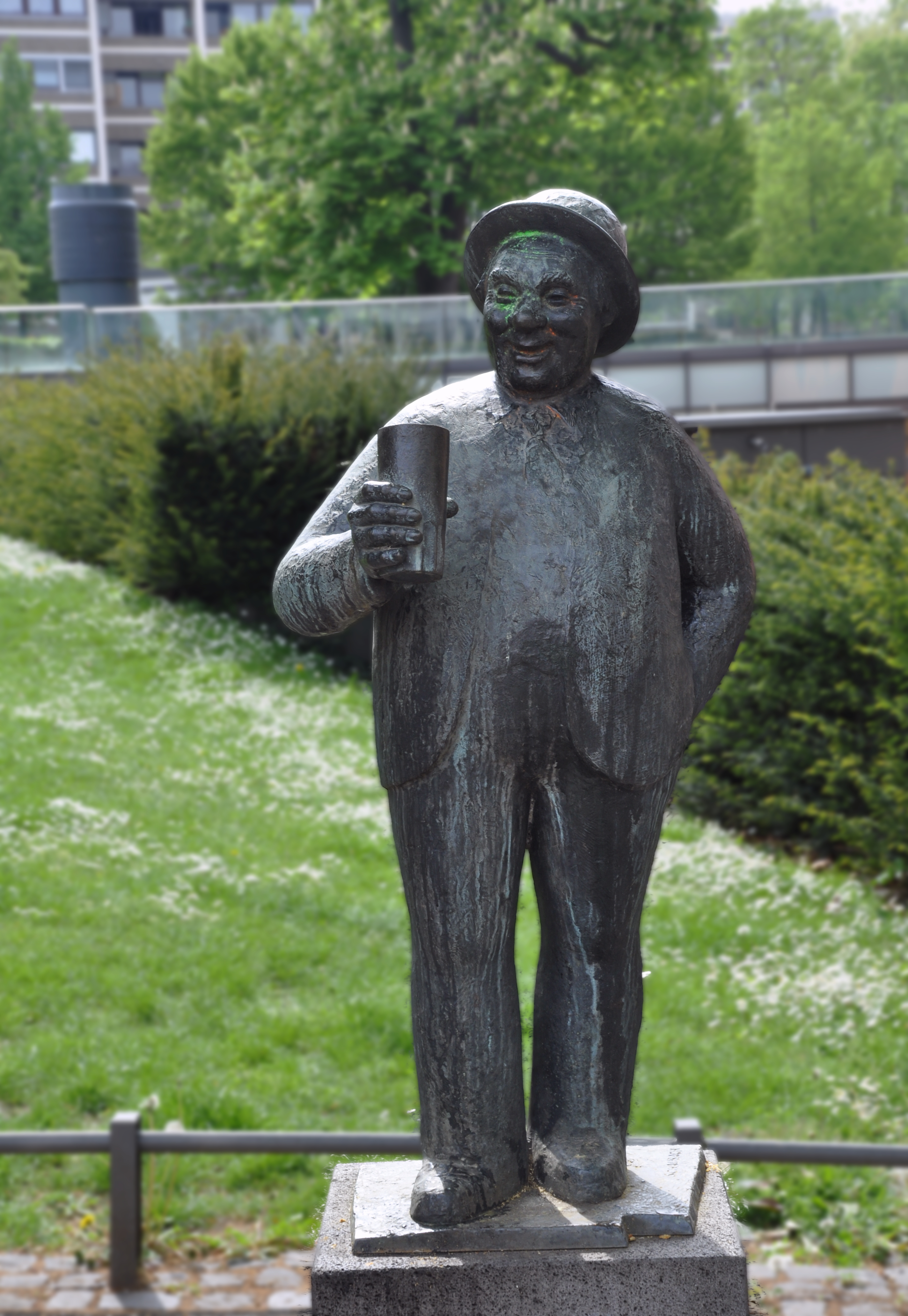 Mainz, Schillerstraße, Schoppenstecher-Standbild